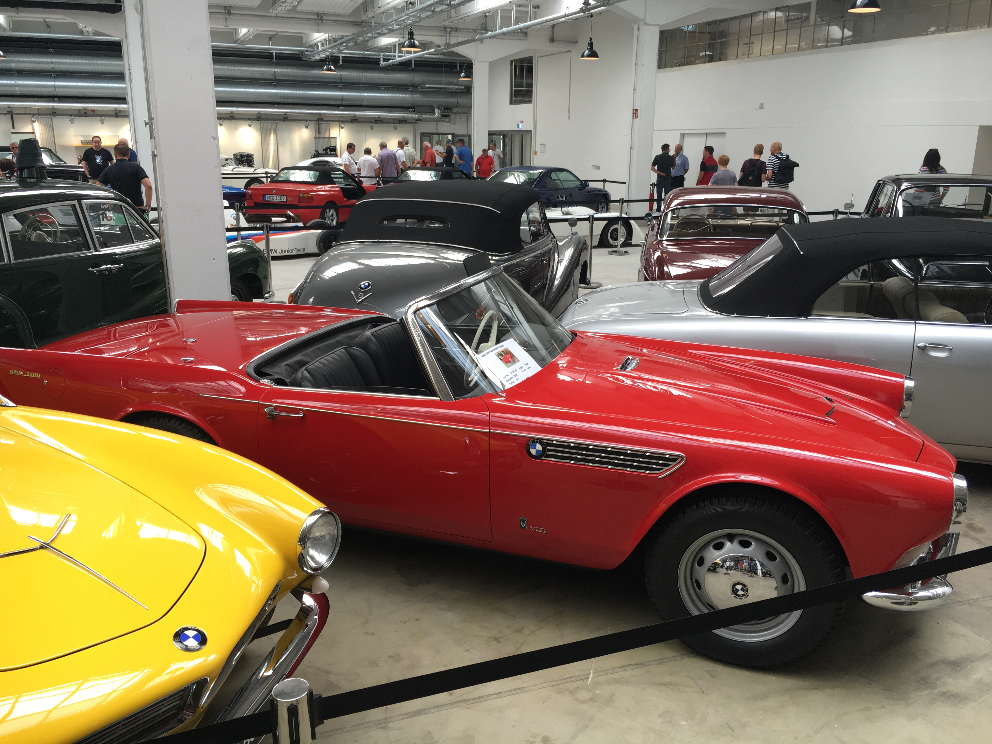 BMW 3200 Michelotti Vignale (Einzelstück) von 1959 basierend auf dem Fahrgestell eines BMW 507 (Nr. 70184)